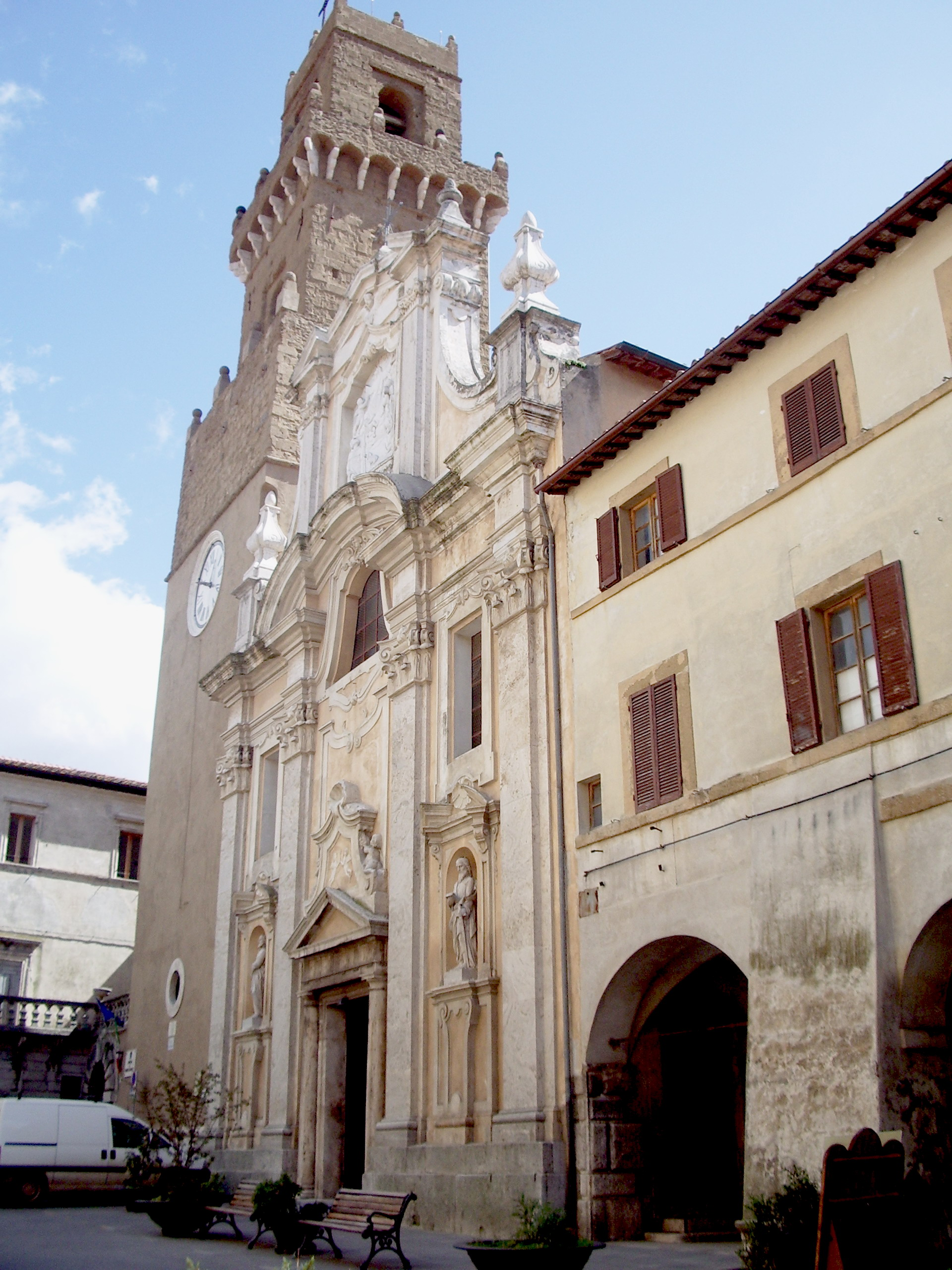 Campanile e facciata principale del Duomo di Pitigliano